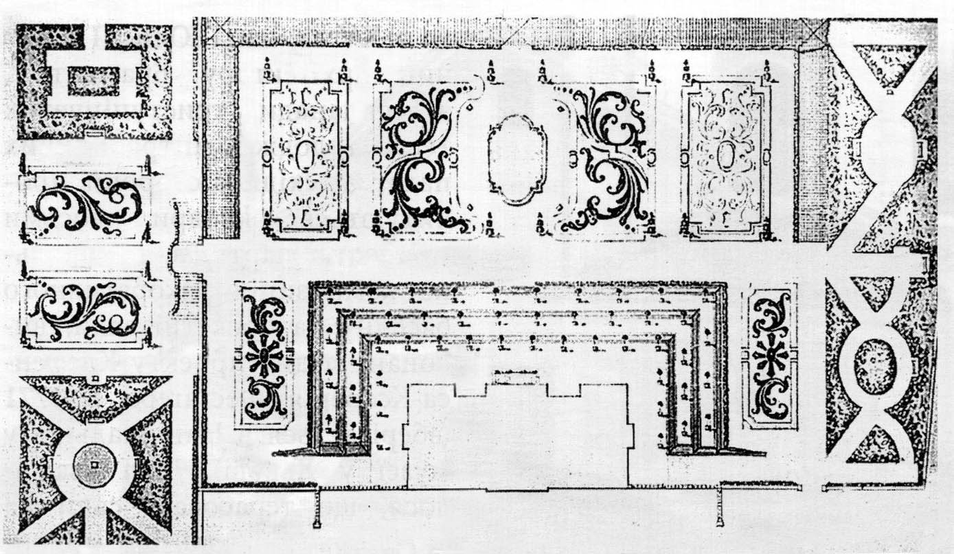 Парк при соборі св. Юра у Львові. Проект Клеменса Ксаверія Фесінґера 1771 року.